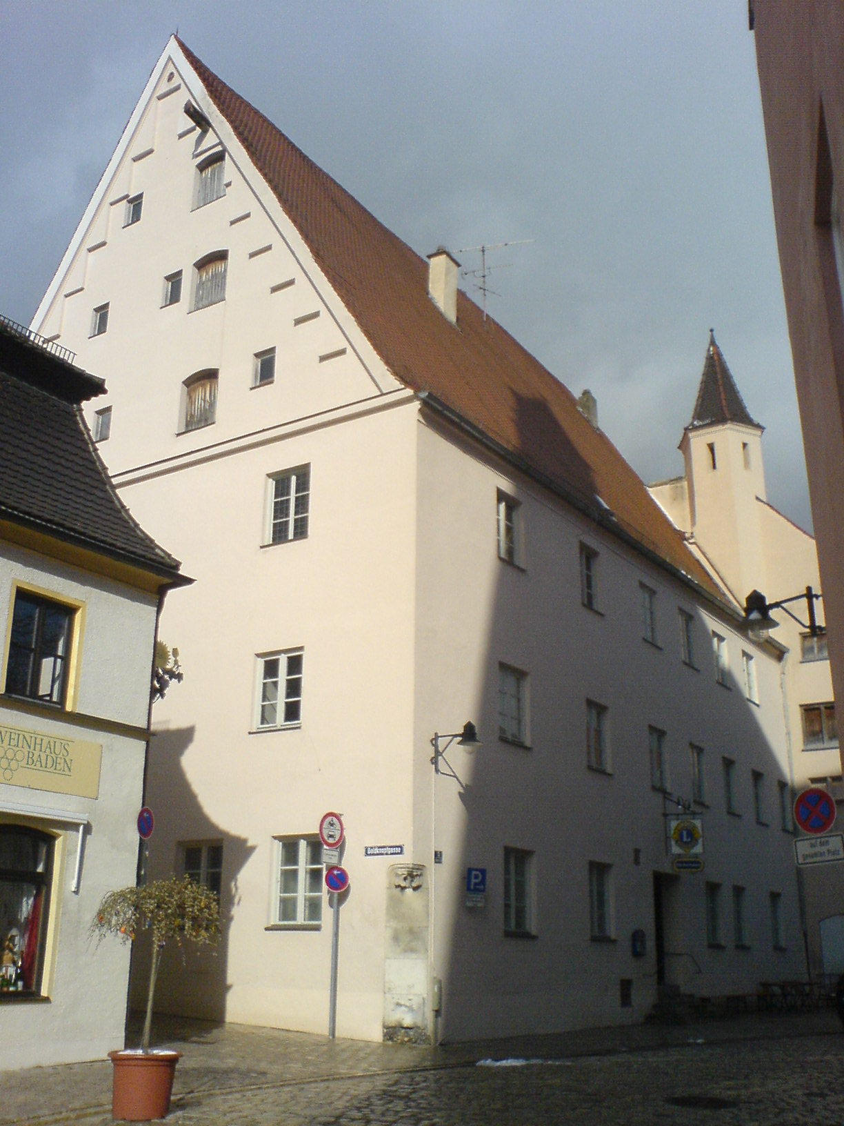 Das Georgianium in Ingolstadt